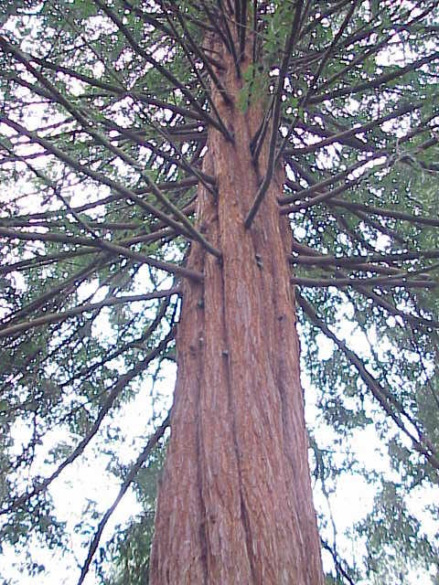 Sequoia sempervirens, Cupressaceae. Image no. 1.